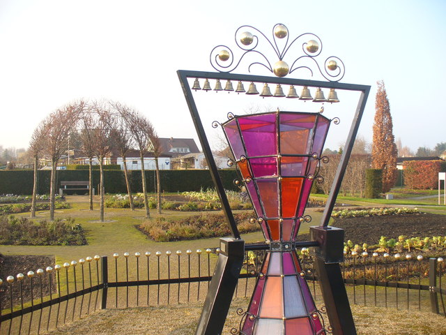 Schlosspark Oranienburg - Temporagarten